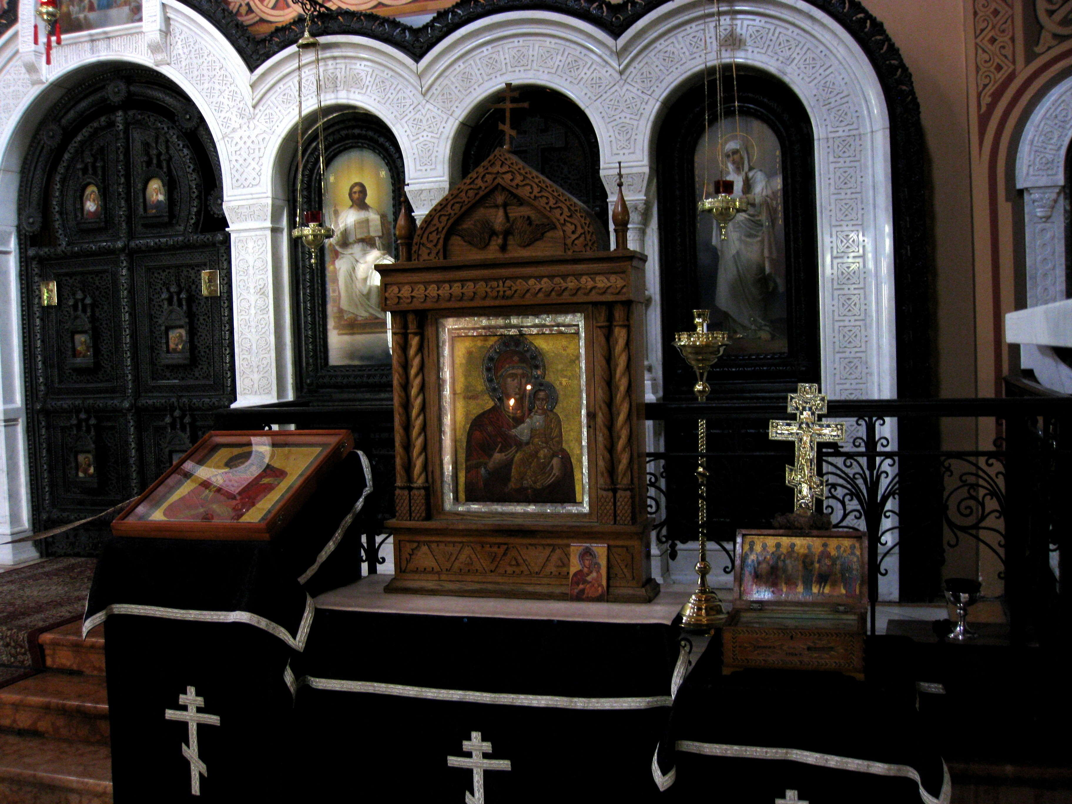 Church of Saint Mary Magdalene כנסיית מריה מגדלנה (כנסיית הבצלים)